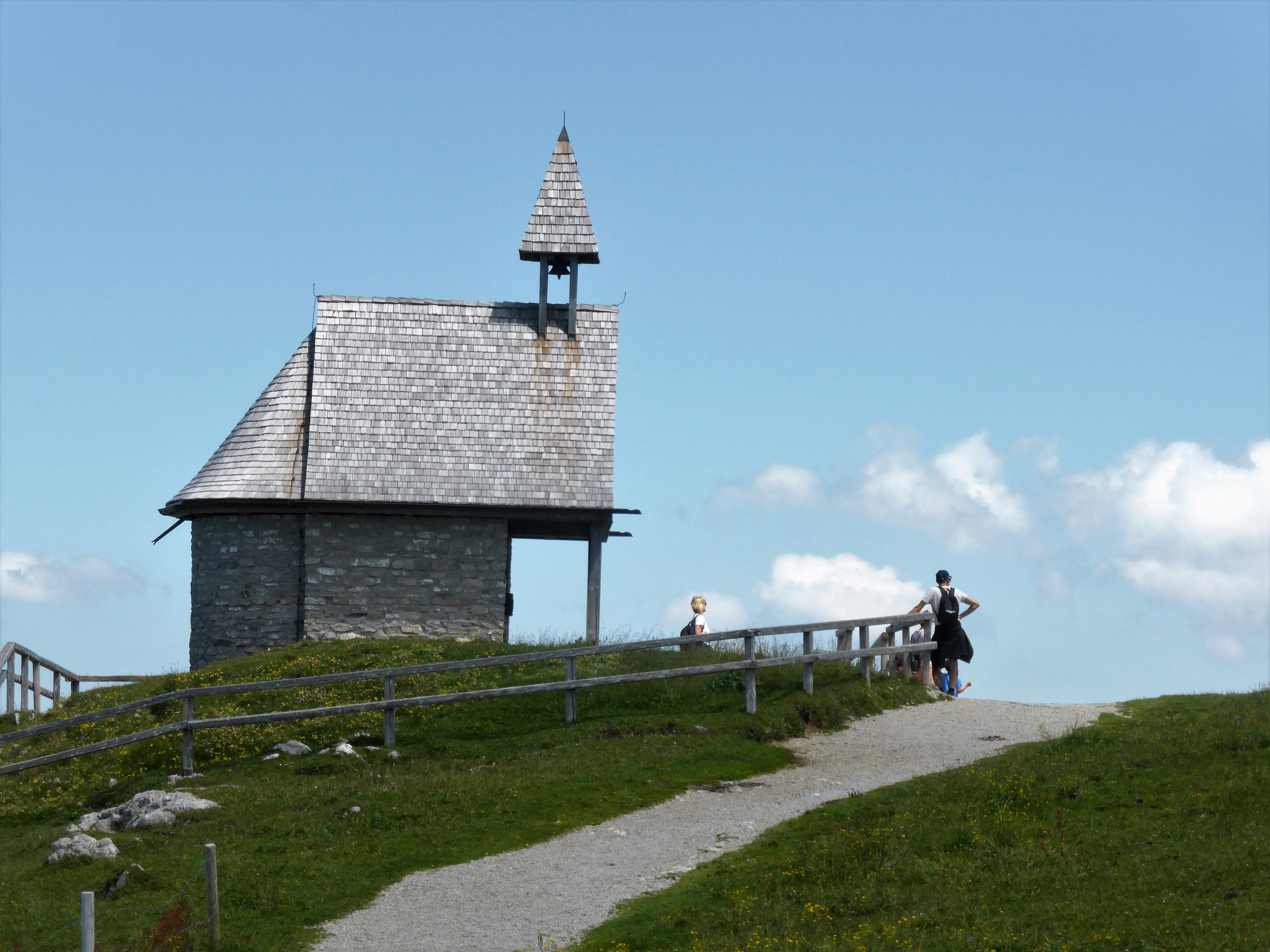 Die Steinlingkapelle steht etwas seitlich von der Steinlingalm am Fuße des Kampenwand-Massivs in den Chiemgauer Alpen.